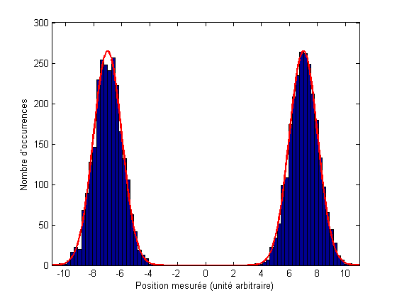 Simulation numérique des résultats obtenus lors de la mesure de la position d'une particule quantique (nombre total de mesures n=5000). L'état de la particule est .